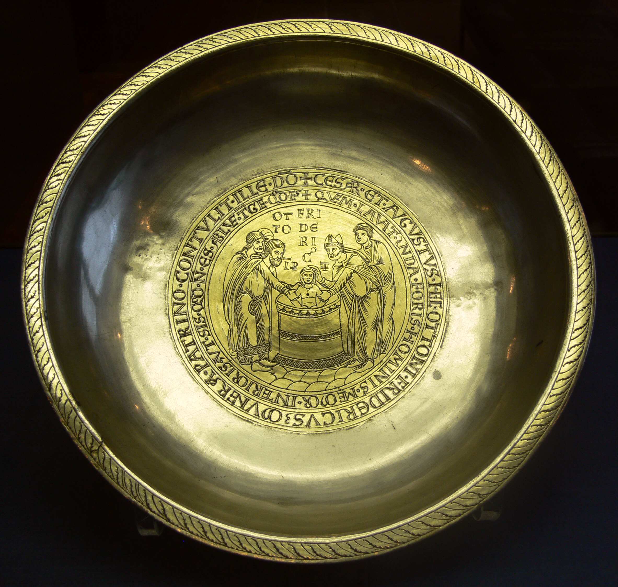 So genannte Taufschale Friedrichs I. Barbarossa, Silber, teilweise vergoldet, Aachen (?) um 1160 Kunstgewerbemuseum Berlin, Inv. Nr. 33,25